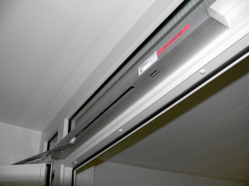 Integrierte Feststellanlage. Feststelleinrichtung, Rauchmelder und Spannungsversorgung sind in einem Gehäuse untergebracht.Autor: Lars Karlsson.